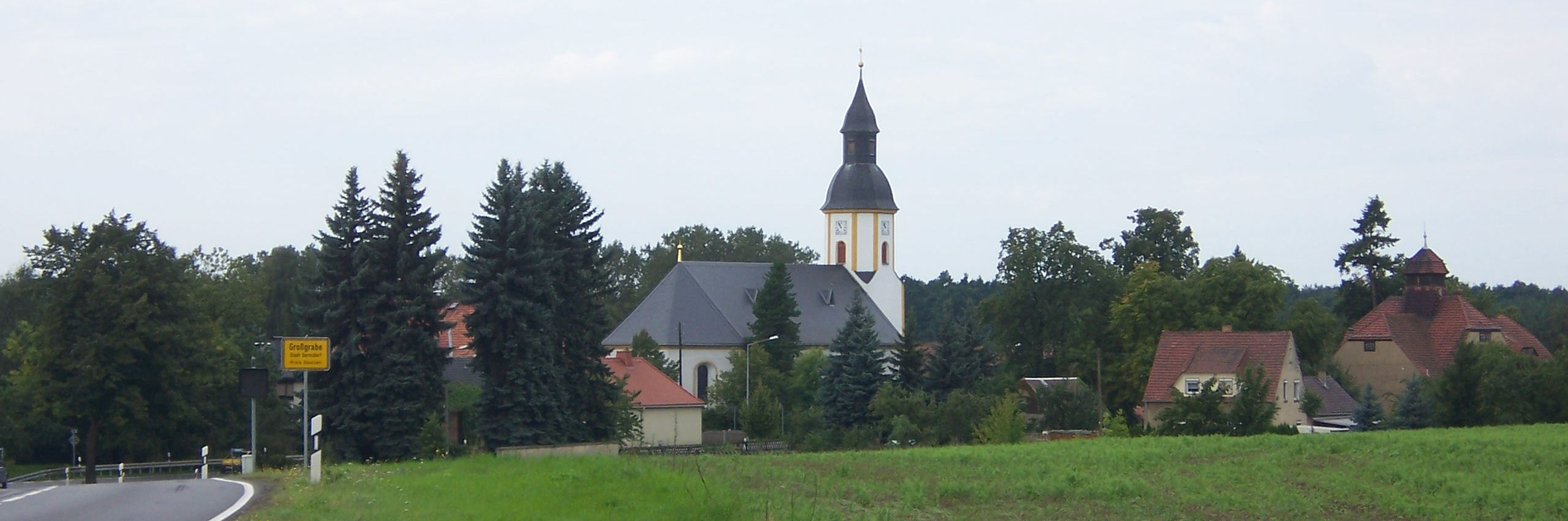 Ortsbild von Großgrabe (Oberlausitz, Sachsen)